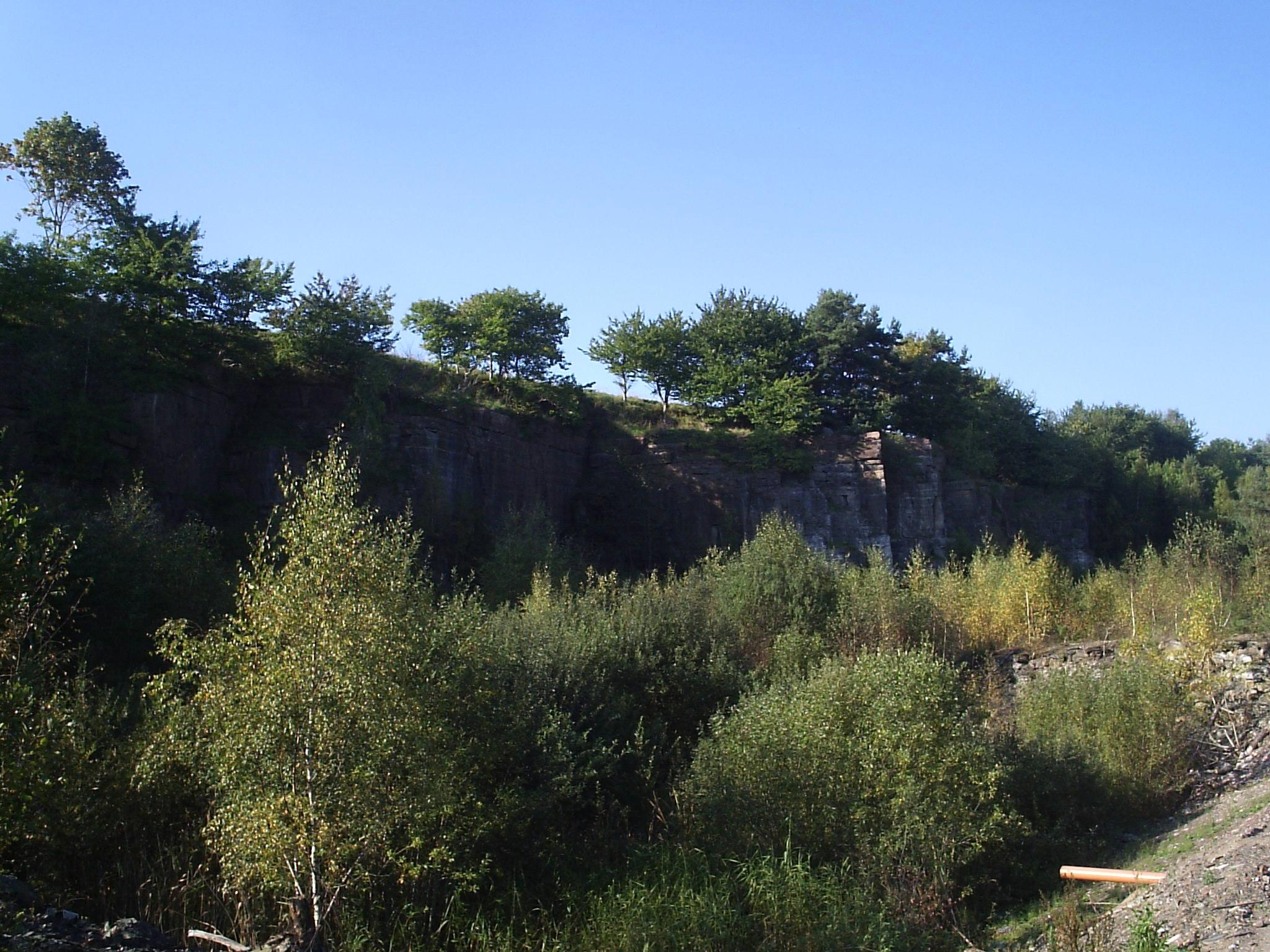 Bilden är fotograferad av Harri Blomberg. Photo by Harri Blomberg.